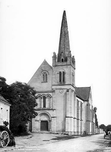 Ensemble sud-ouest.